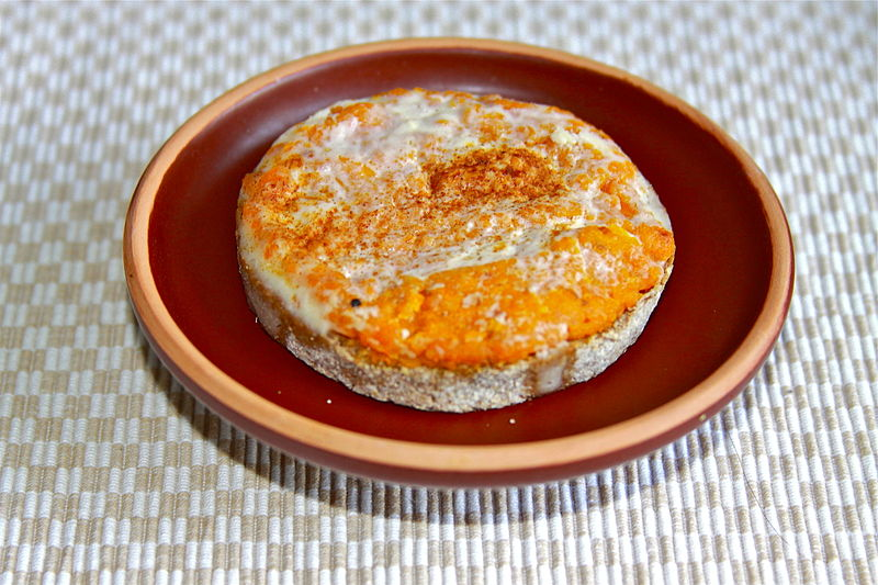 Sklandrausis